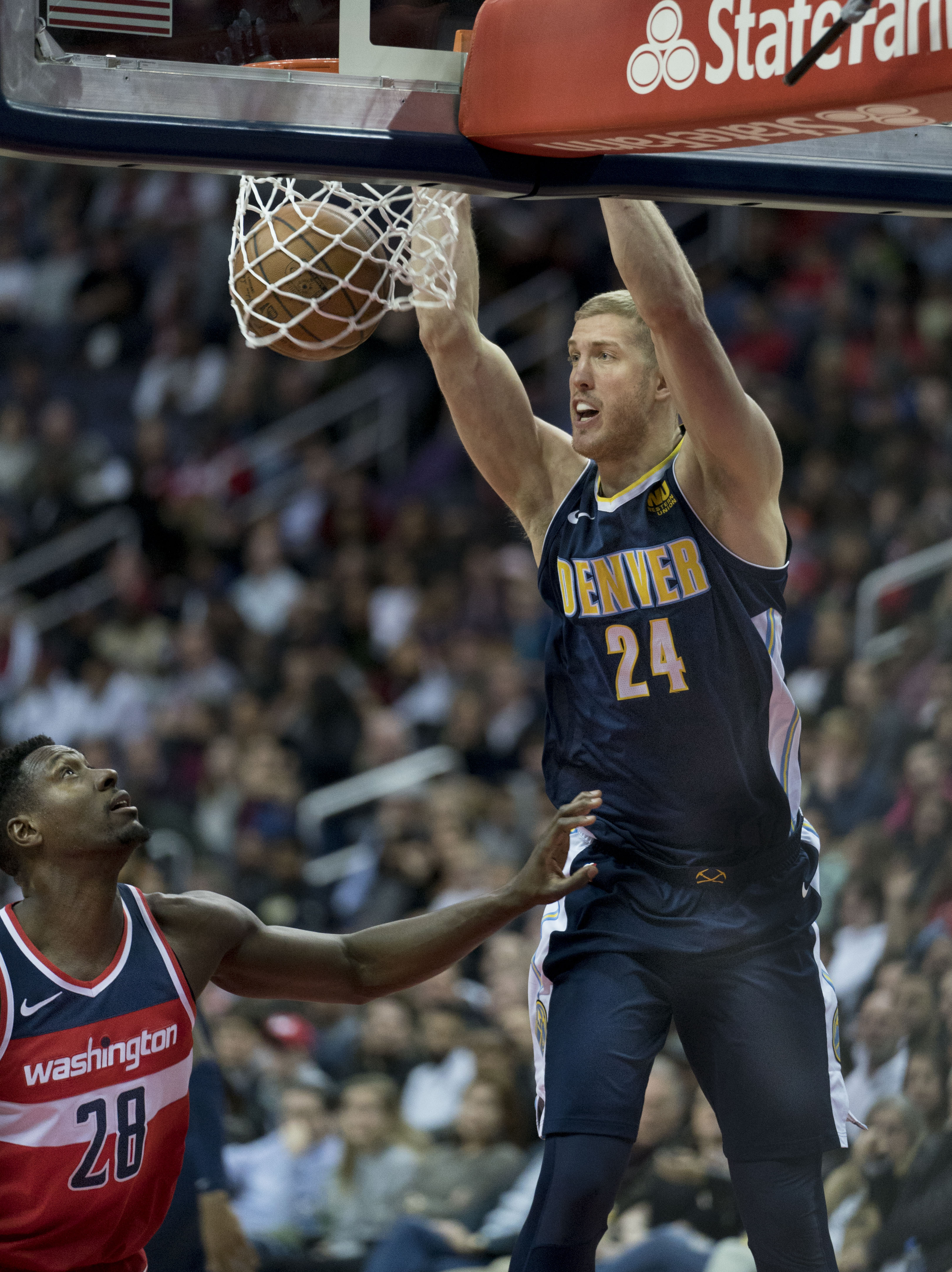 Nuggets at Wizards 3/23/18